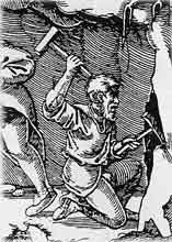 Biergmann, fréier.